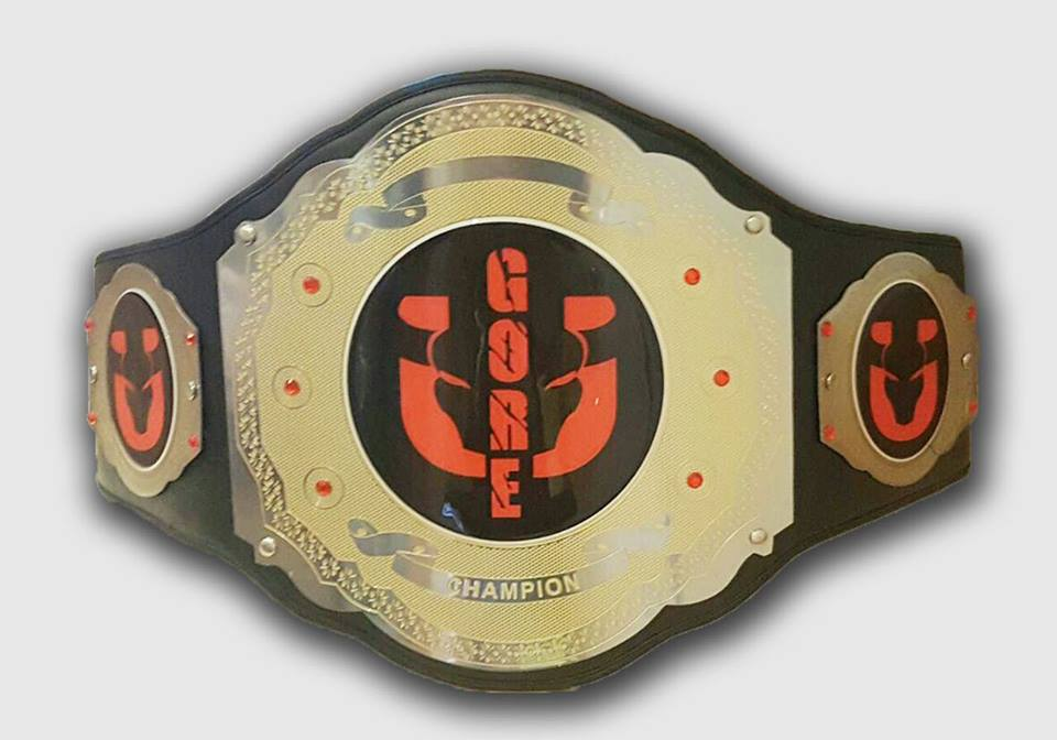 Bullfight Gore Title